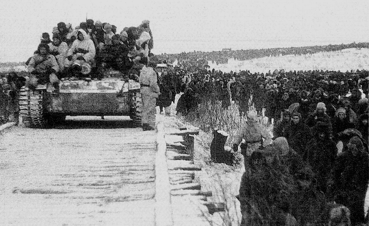 Uno Stug III in movimento accanto alle colonne in rotta dell'Asse dopo lo sfondamento del fronte del Don